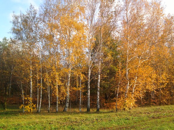 Осенний лес в окрестностях села Коротяк